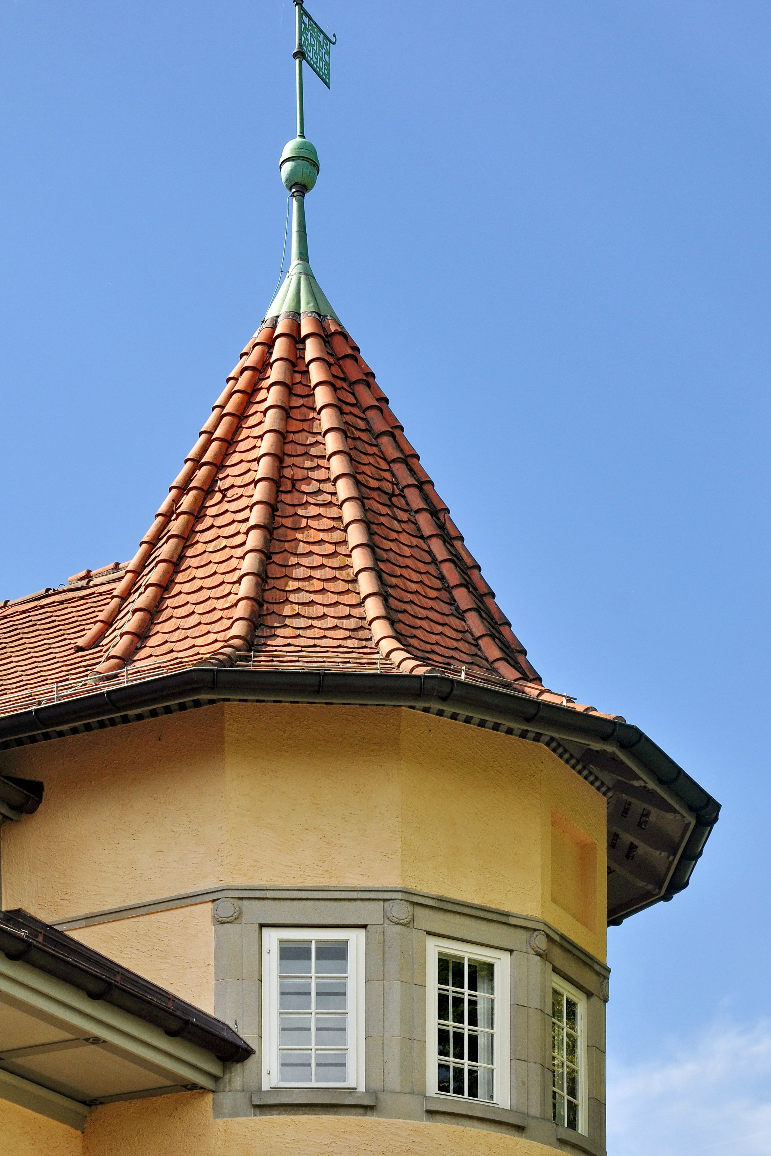 Wohnhaus von C. G. Jung, Seestrasse 228 in Küsnacht (Switzerland)